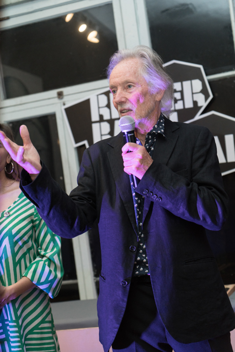 Art Exhibition | Klaus Voormann: „It Started In Hamburg” | Vernissage | Oct 30, 2018